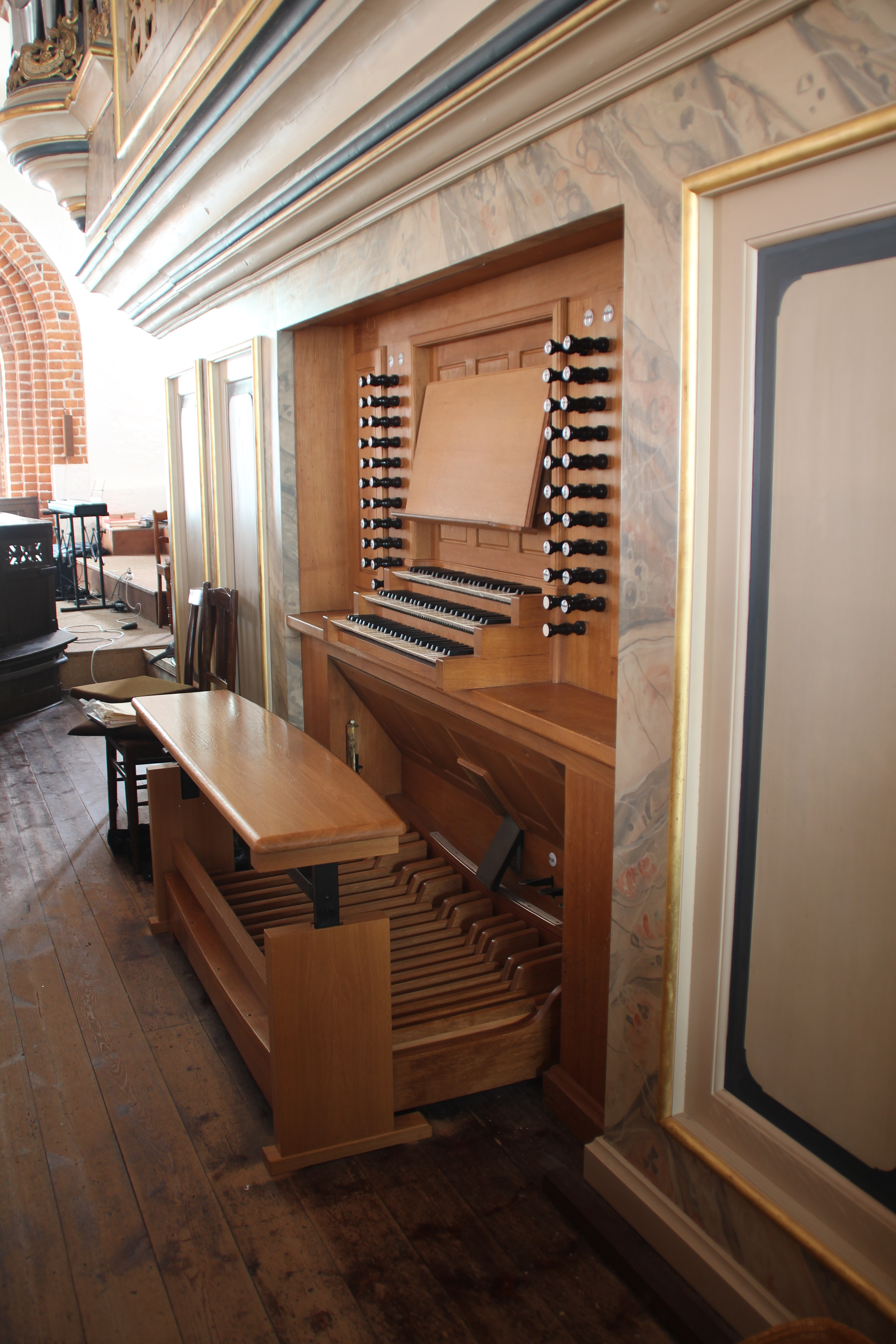 Spielschrank der Johann Georg Heßler-Orgel (Hauptorgel) der Kirche St. Nicolai zu Eckernförde